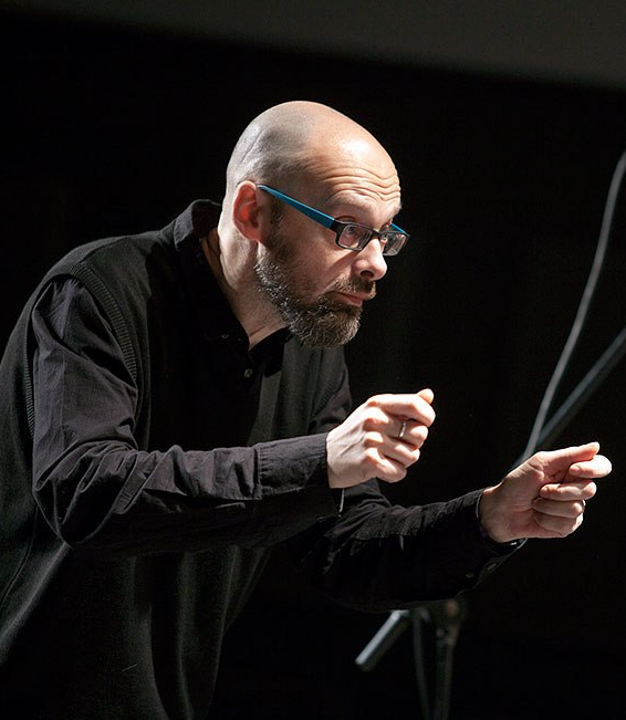 на фото Дмитрий Шубин